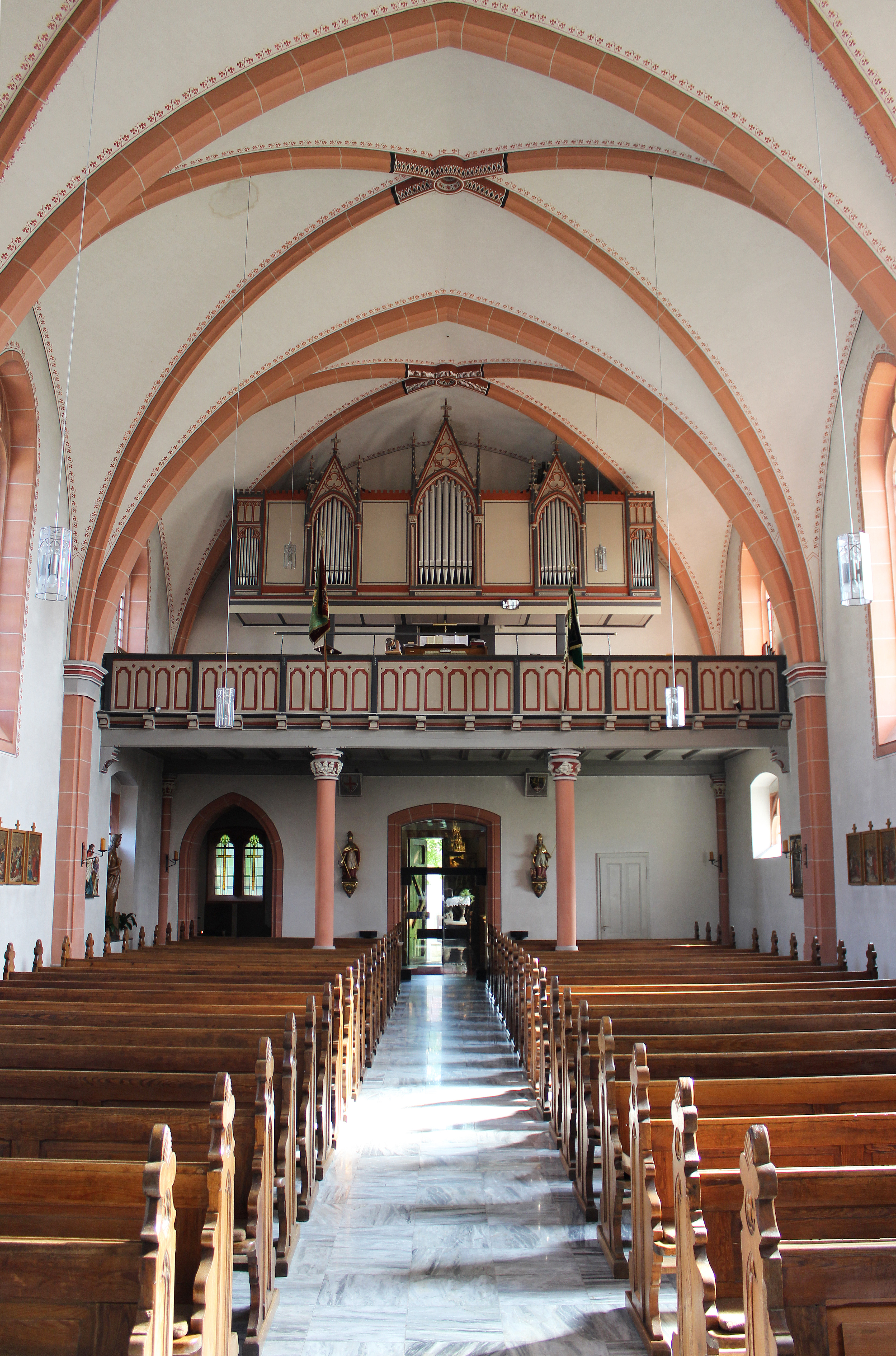 Blick ins Innere der katholischen Kirche St. Nikolaus in Felsberg, einem Ortsteil von Überherrn, Landkreis Saarlouis, Saarland